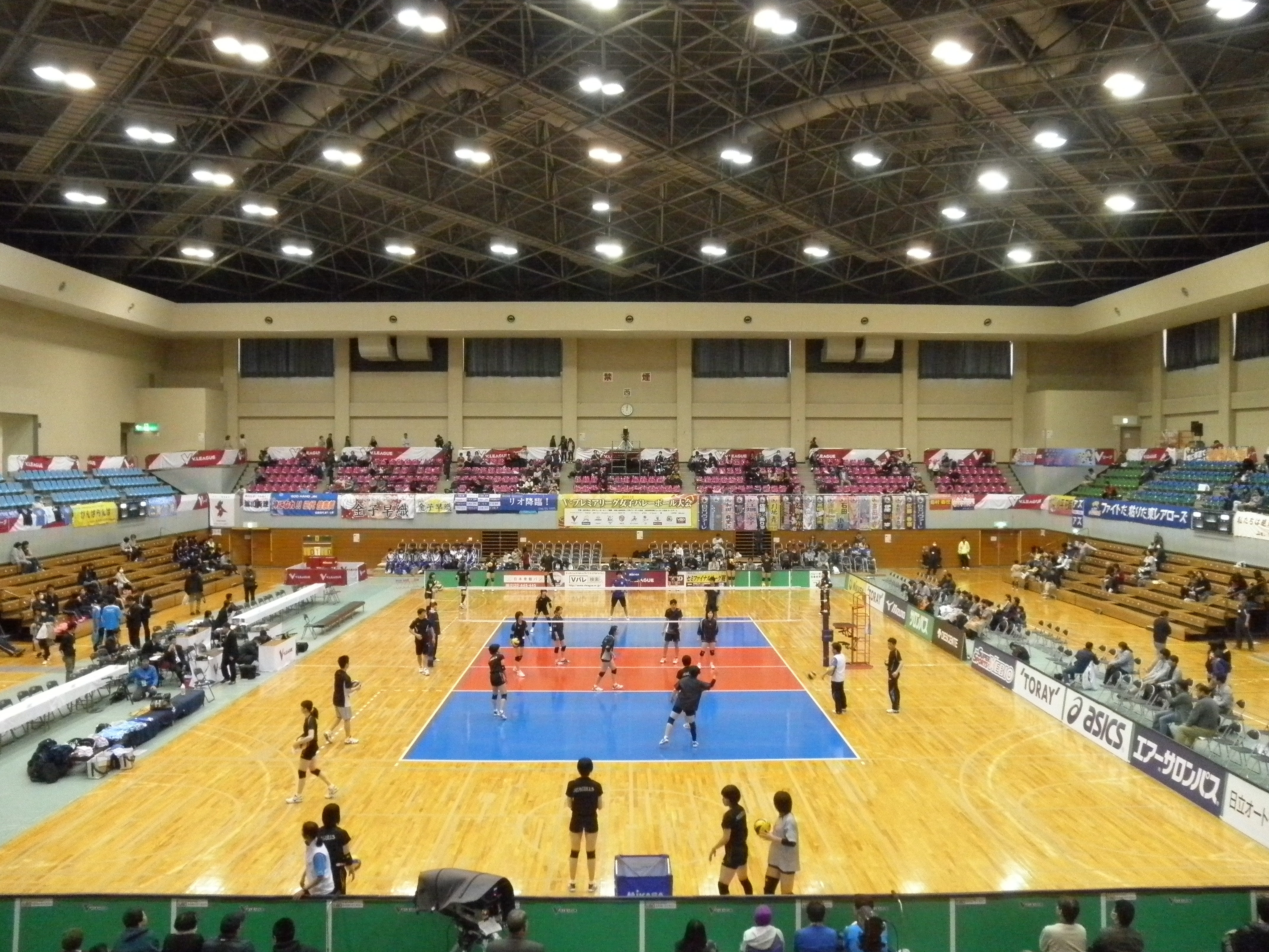 小瀬スポーツ公園体育館のメインアリーナ